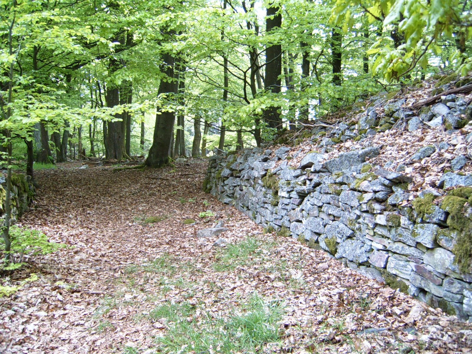 Bildbeschreibung: Ringwall Torgasse * Quelle: selbst fotografiert * Fotograf: Matw